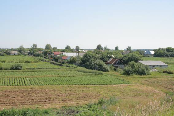 Тамбовская область, поселок Песковатка